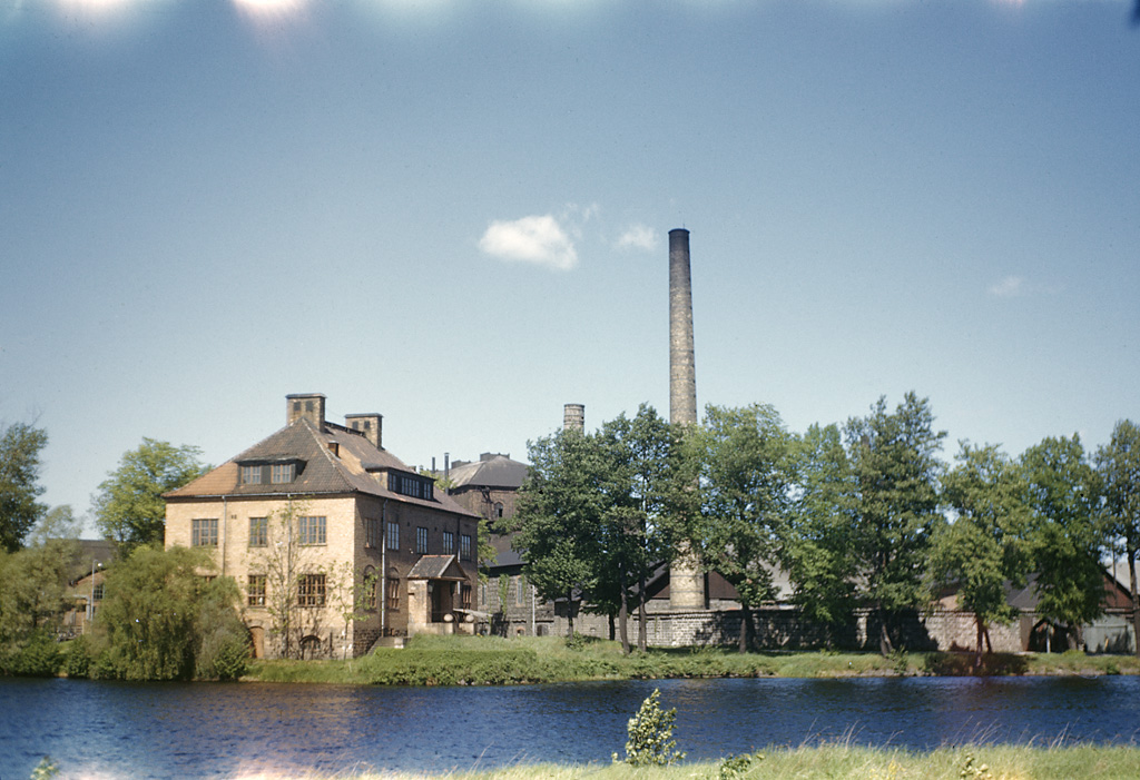 Forsbacka ironworks at Gavleån (or Gävelån) River